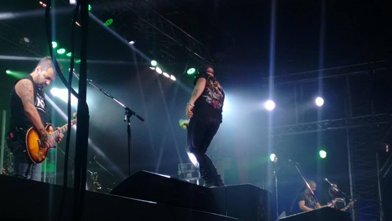 La banda, La Beriso en Mendoza durante un concierto.